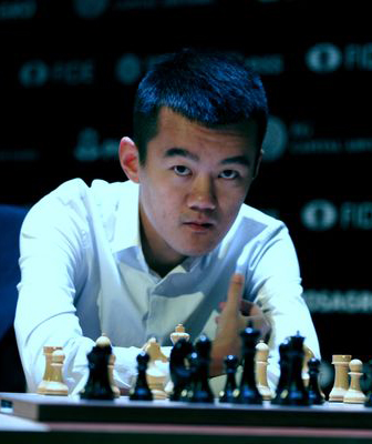 Дин Лижэнь, Турнир Претендентов 2018